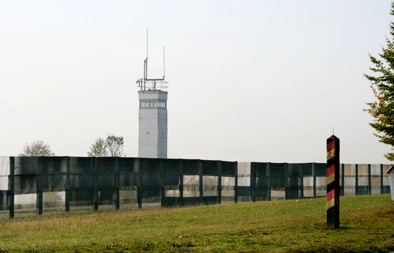 Beschreibung: "Grenzsicherungsanlagen" der DDR: Grenzmarkierungspfahl (vermutlich Nr. 1721), Streckmetallzaun und Beobachtungsturm Quelle: selbst fotografiert 10/2005, verkleinert auf 1200x800pix